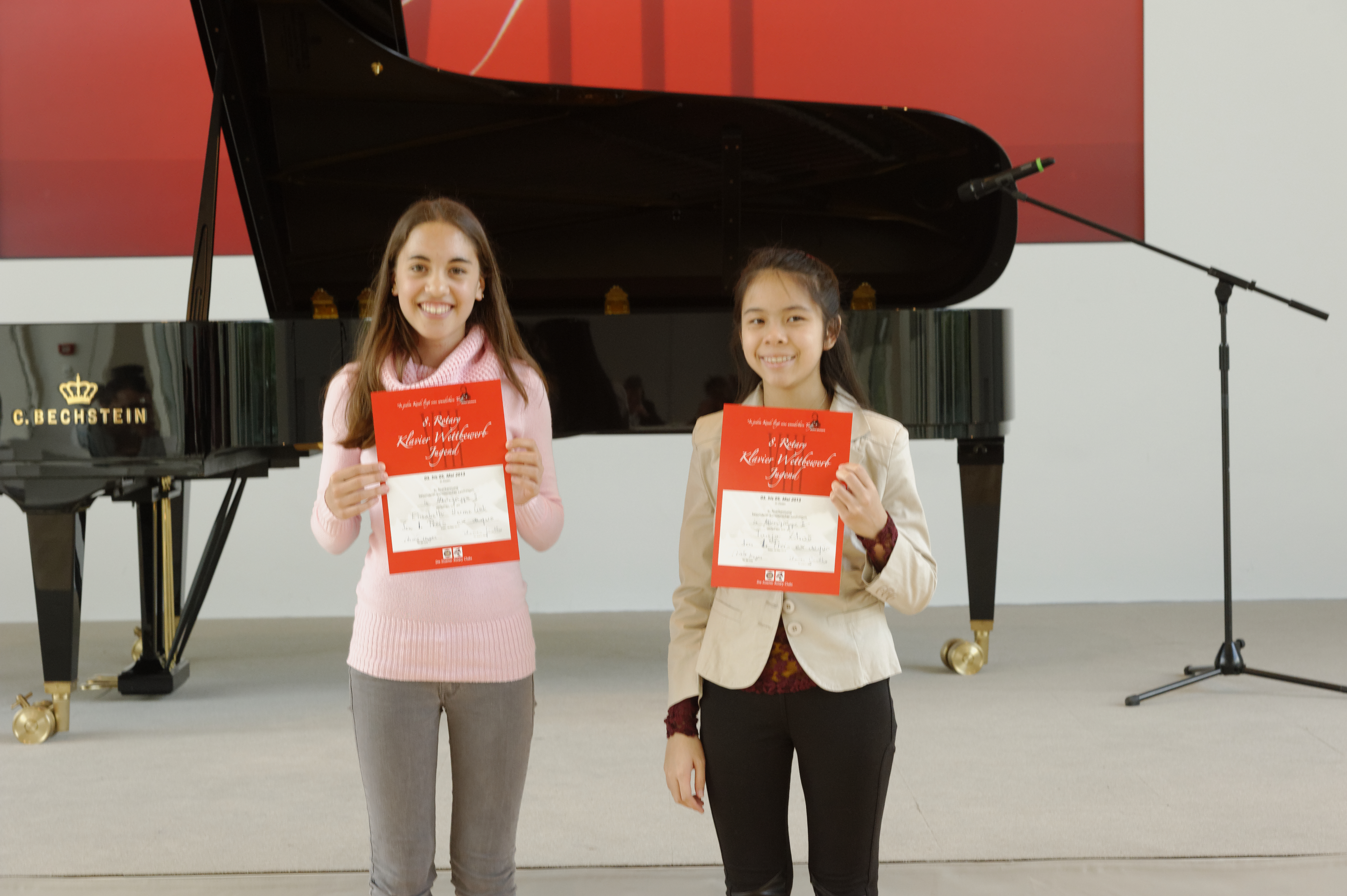 Rotary Klavierwettbewerb 2013